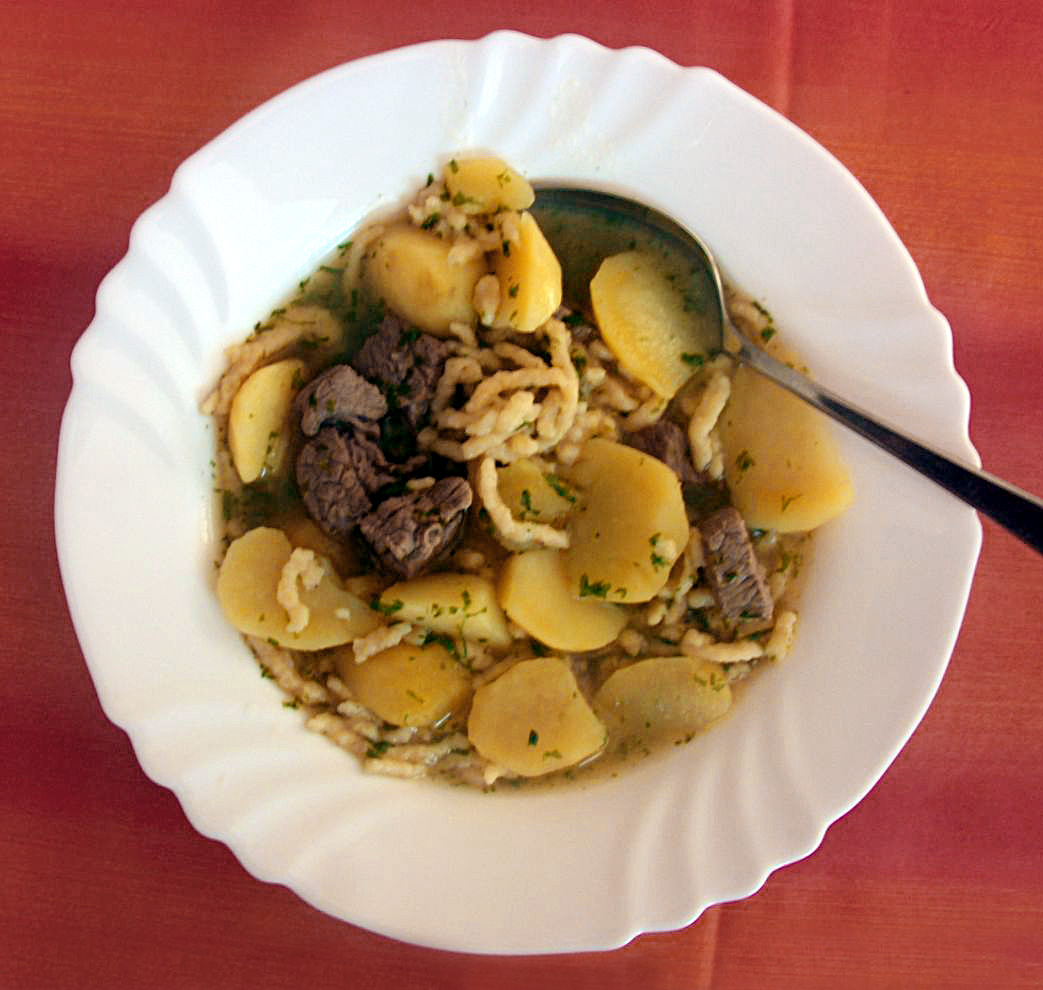 Bildbeschreibung: Gaisburger Marsch Quelle: selbst erstellt Fotograf: Benutzer:MarkusHagenlocher Datum: Juni 2006